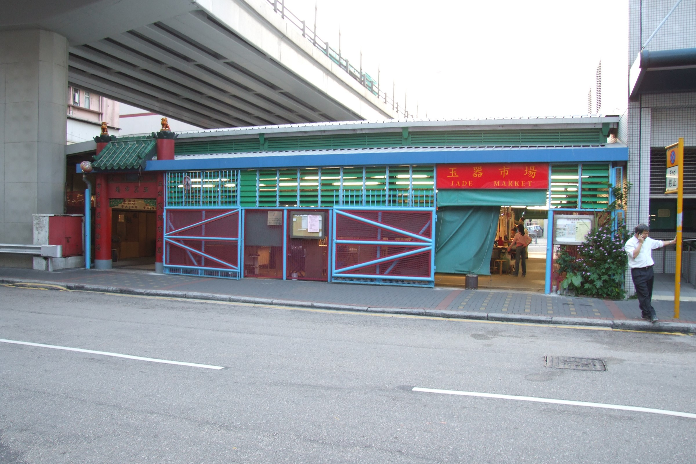 油麻地玉器市場